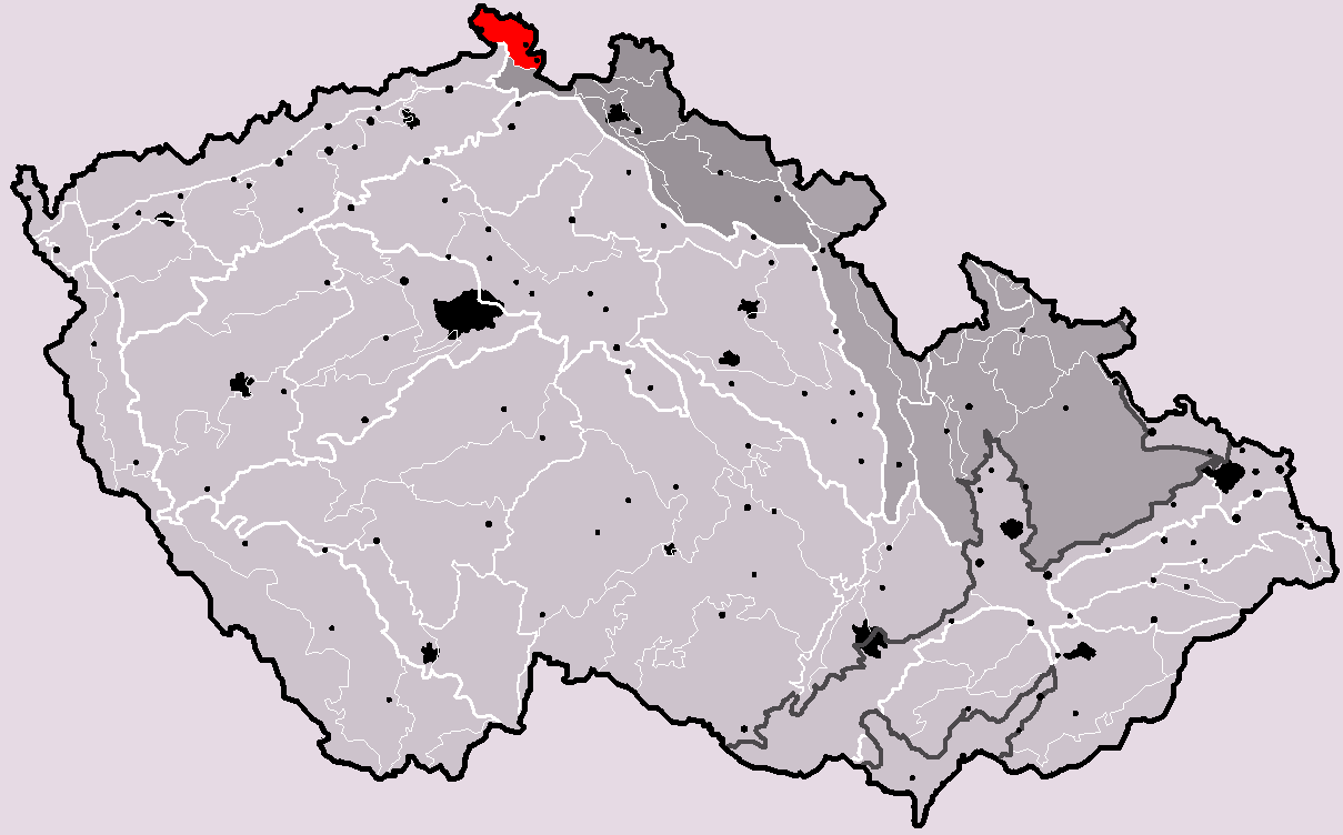 Poloha geomorfologického celku Šluknovská pahorkatina v rámci České republiky. Hercynský systém Hercynská pohoří I Česká vysočina I4 (IV) Krkonošsko-jesenická subprovincie I4A (IVA) Krkonošská oblast I4A-1 (IVA-1) Šluknovská pahorkatina